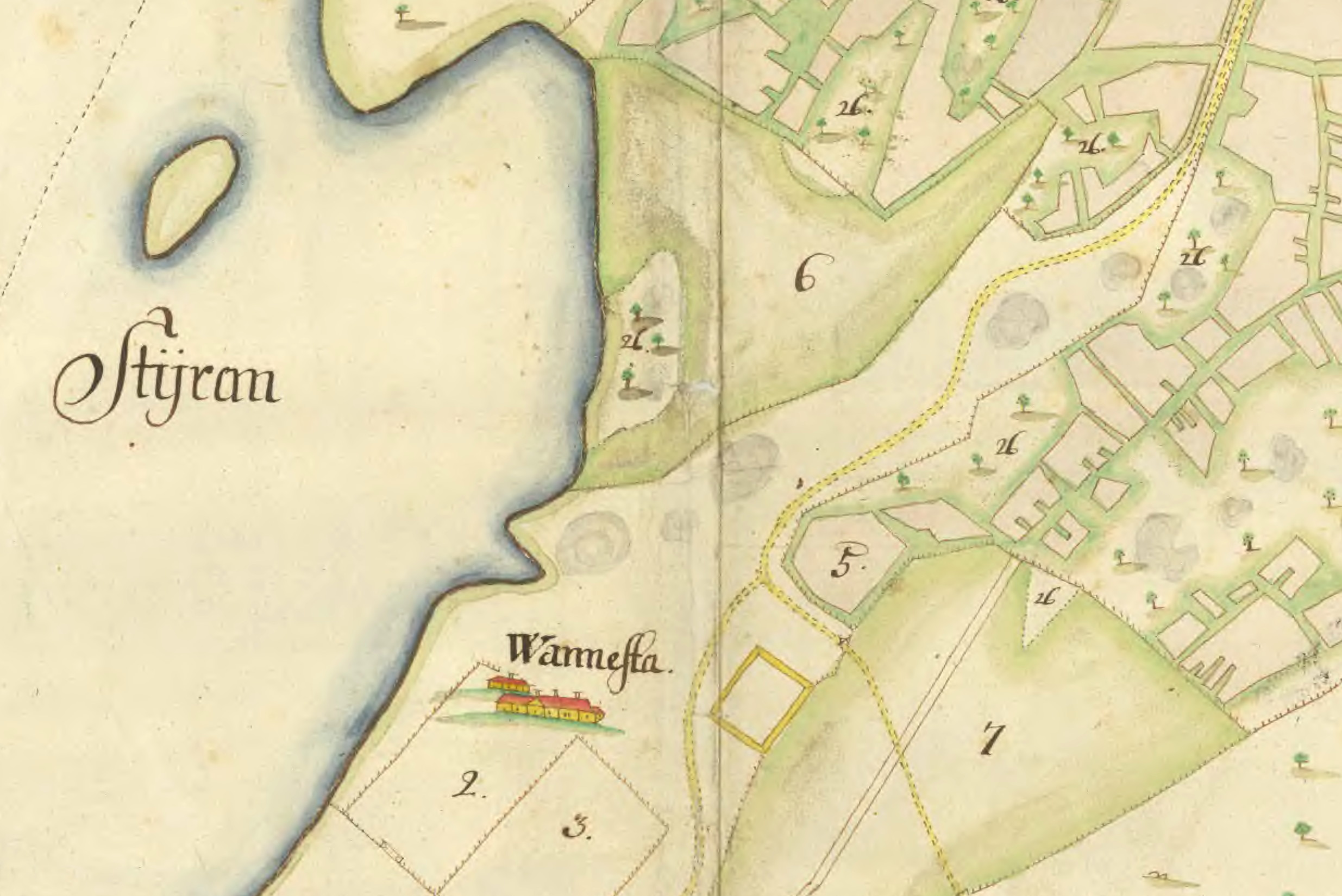 Karta över sätesgården Wanstad (Detalj)